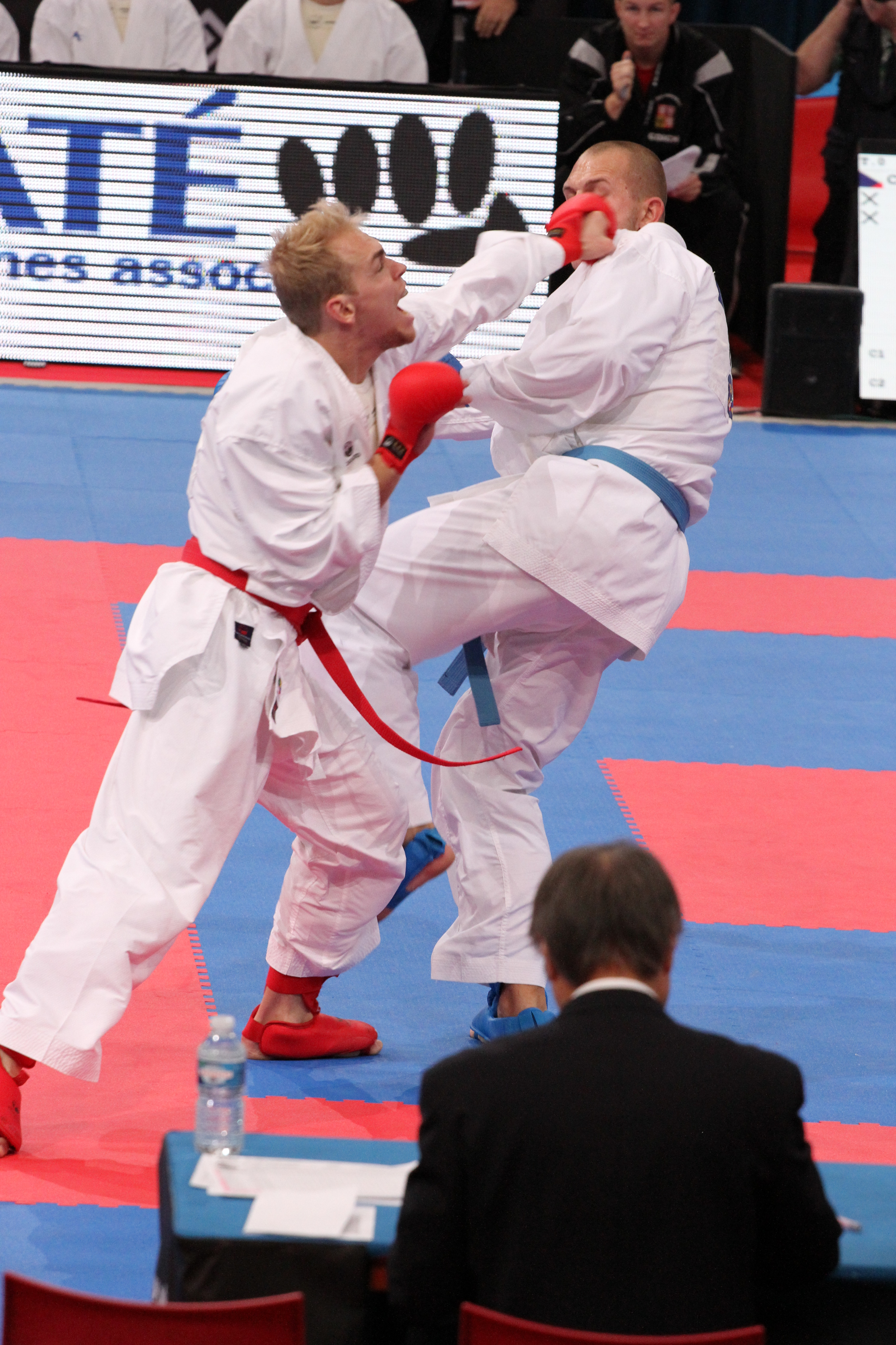 Noah Bitsch bei der WKF Karate-Weltmeisterschaft 2012 in Paris